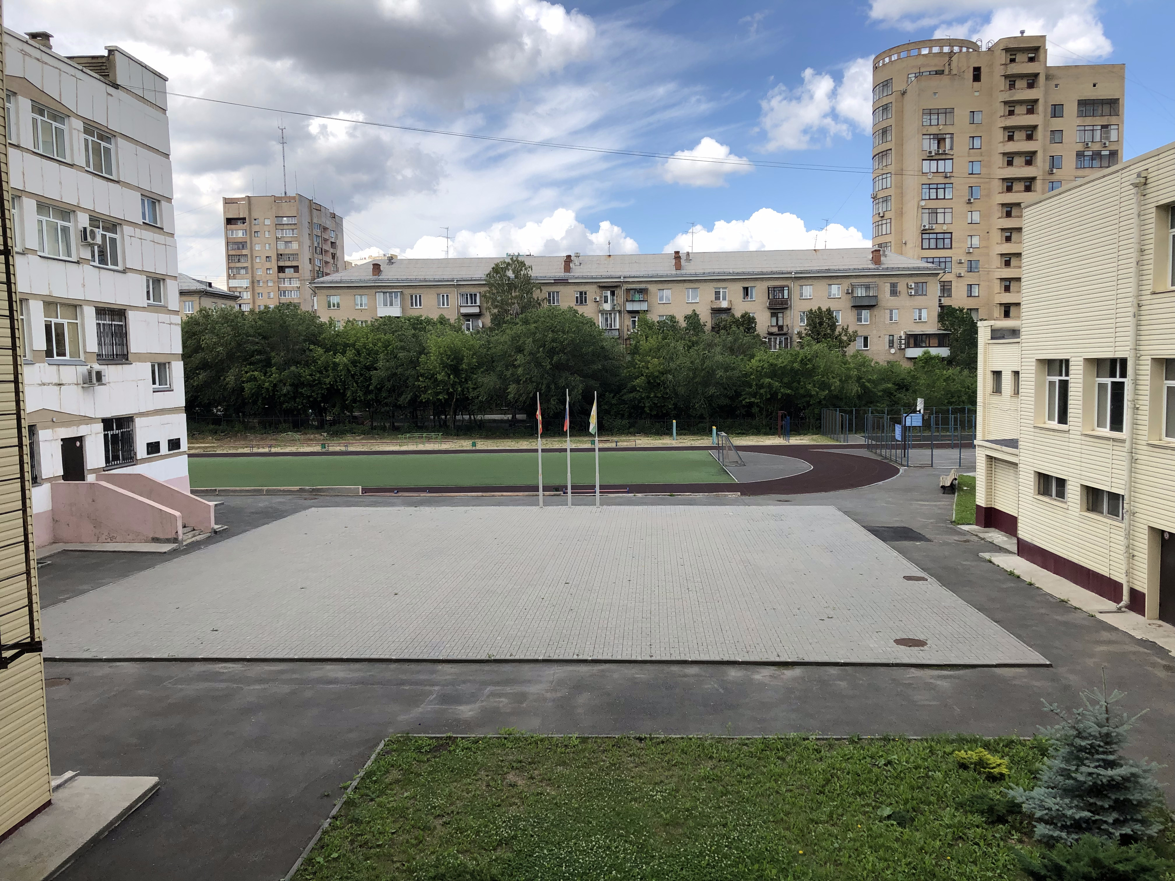 Стадион 11 лицей Челябинск